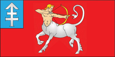 Беларуская (тарашкевіца): Сьцяг Гальшанаў